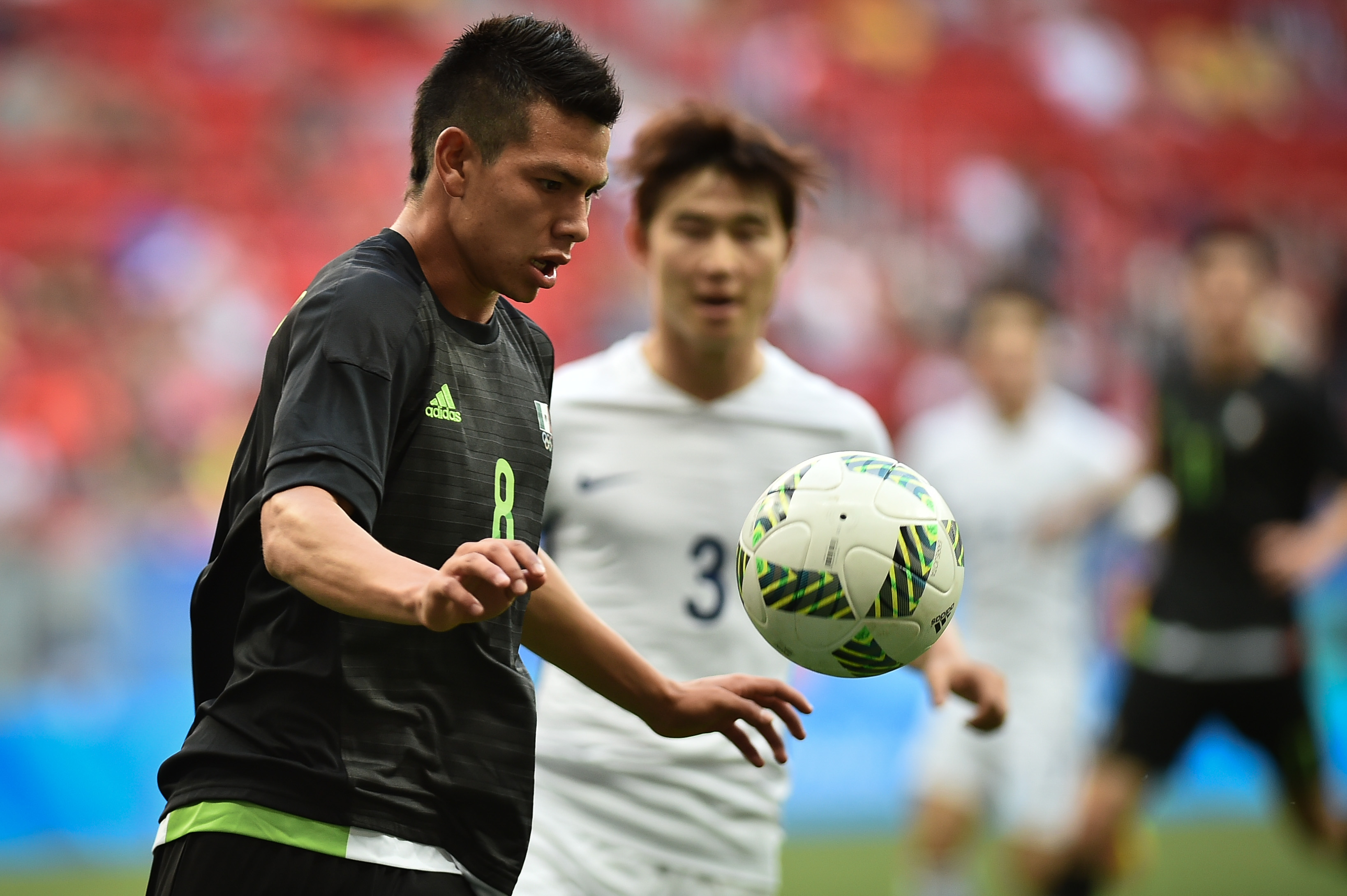 Estádio Nacional de Brasília Mané Garrincha, Brasília, DF, Brasil, 10/8/2016 Foto: Andre Borges/Agência Brasília. O time da Coréia do Sul classificou-se para a próxima fase do torneio de futebol masculino da Olimpíada com uma vitória por 1 a 0 contra o México. Kwon Chang-hoon marcou o gol da vitória sul-coreana aos 32 minutos do segundo tempo.